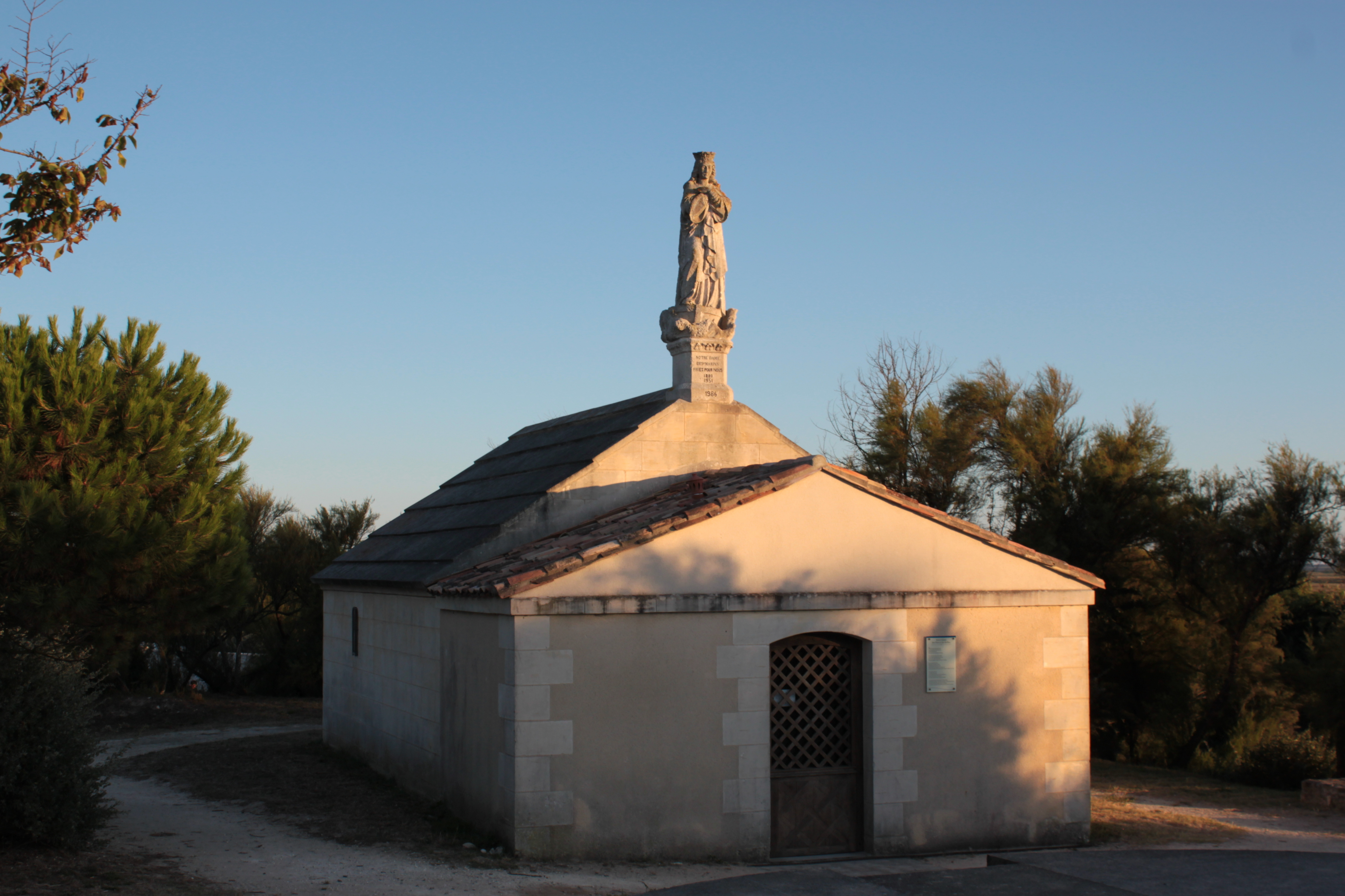 Chapelle Notr-Dame des Flux et Reflux, ou Notre-Dame des Marins, Fr-17-Les Portes-en-Ré.